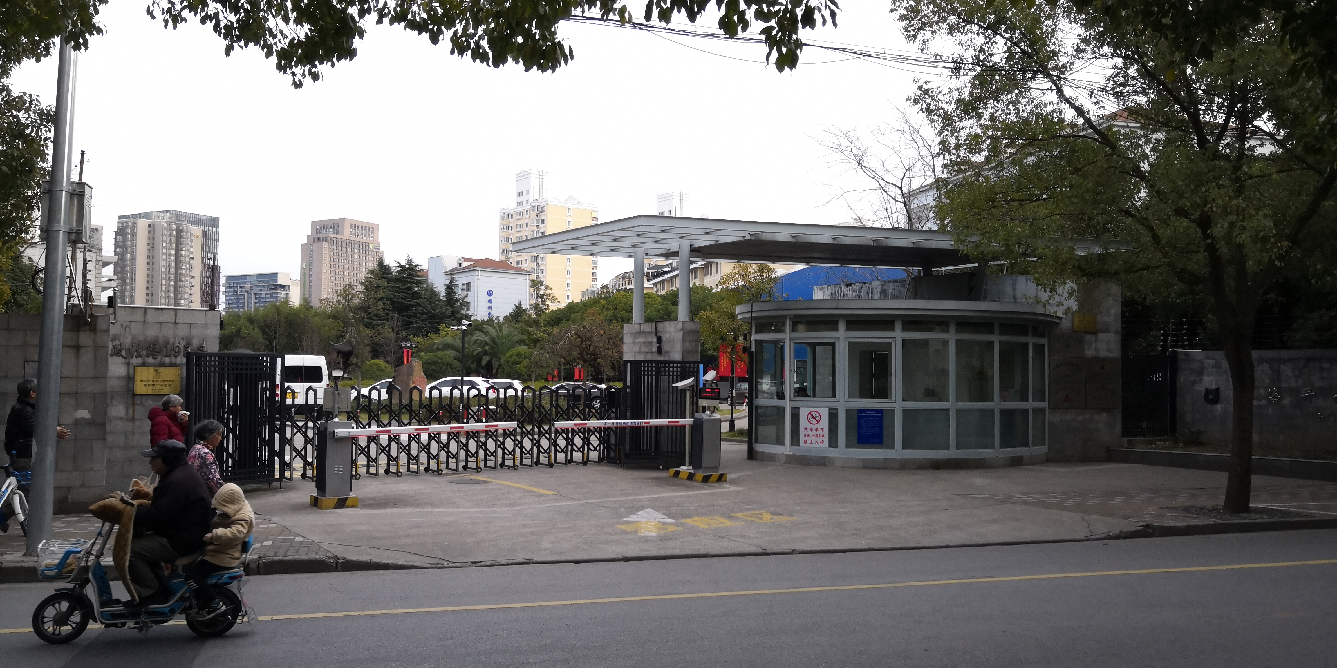 上海开放大学国顺路校区侧门（原为正门，上海市杨浦区政法路195号）